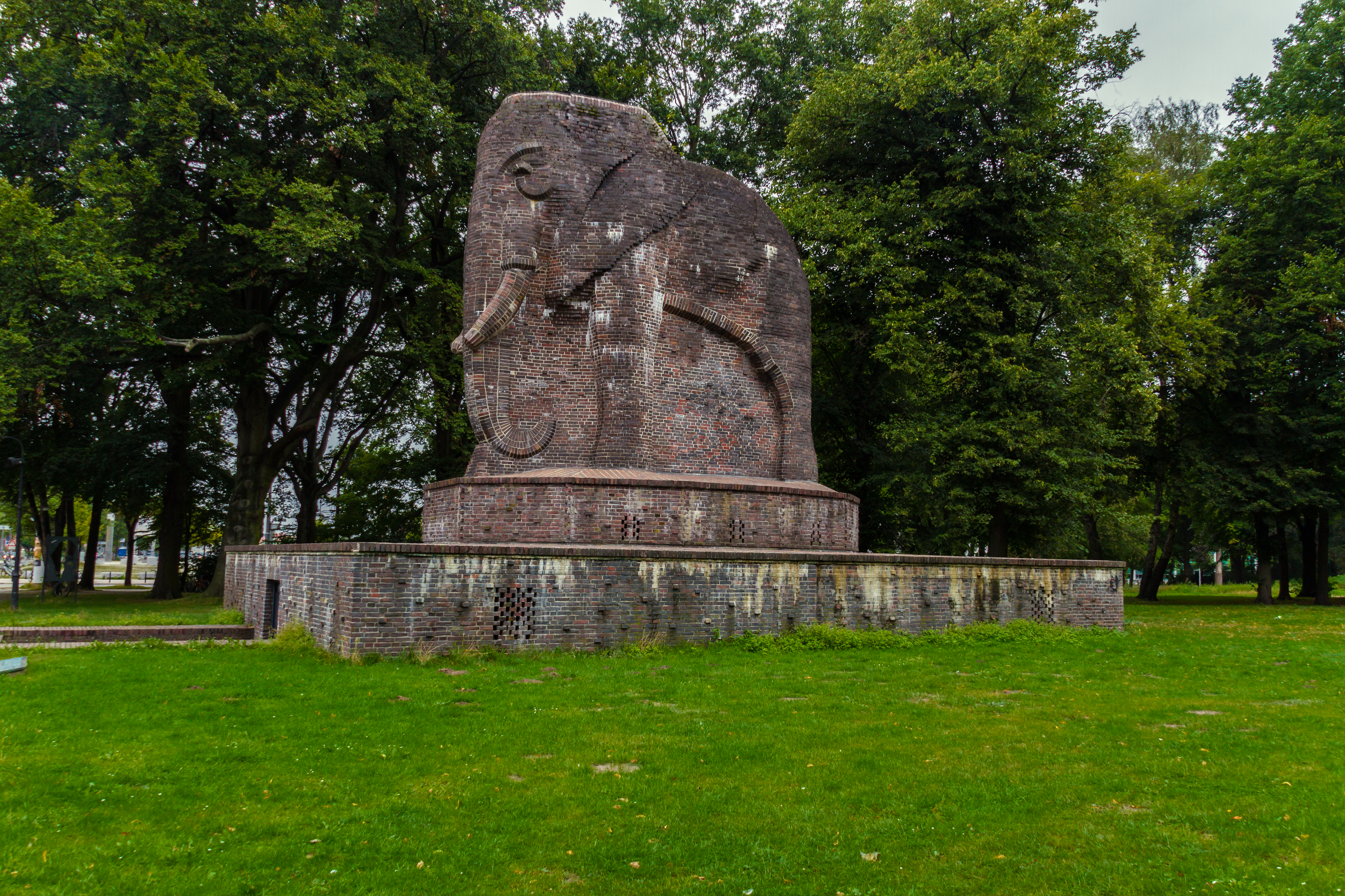 Kolonial-Ehrenmal, Anti-Kolonial-Denk-Mal in Bremen, Gustav-Deetjen-AlleeDas abgebildete Objekt ist ein geschütztes Kulturdenkmal in der Freien Hansestadt Bremen, mit der Nr. 1771 beim Landesamt für Denkmalpflege registriert.